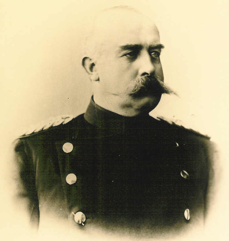 Alkmar II. von Alvensleben (1841-1998)